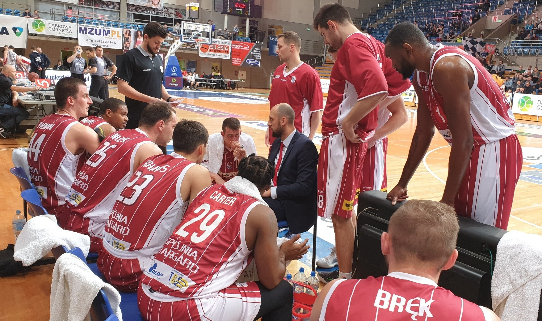 Spójnia w Dąbrowie Górniczej